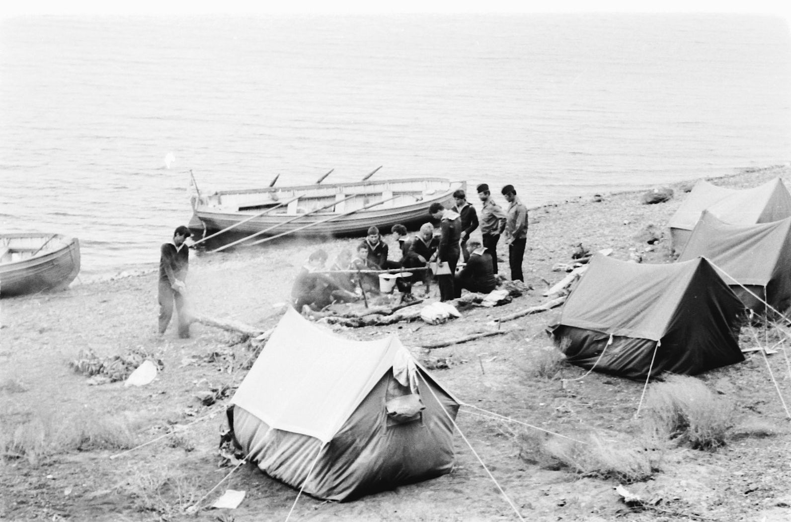 Шестивесельные ялы на озере Болонь (1983 год)